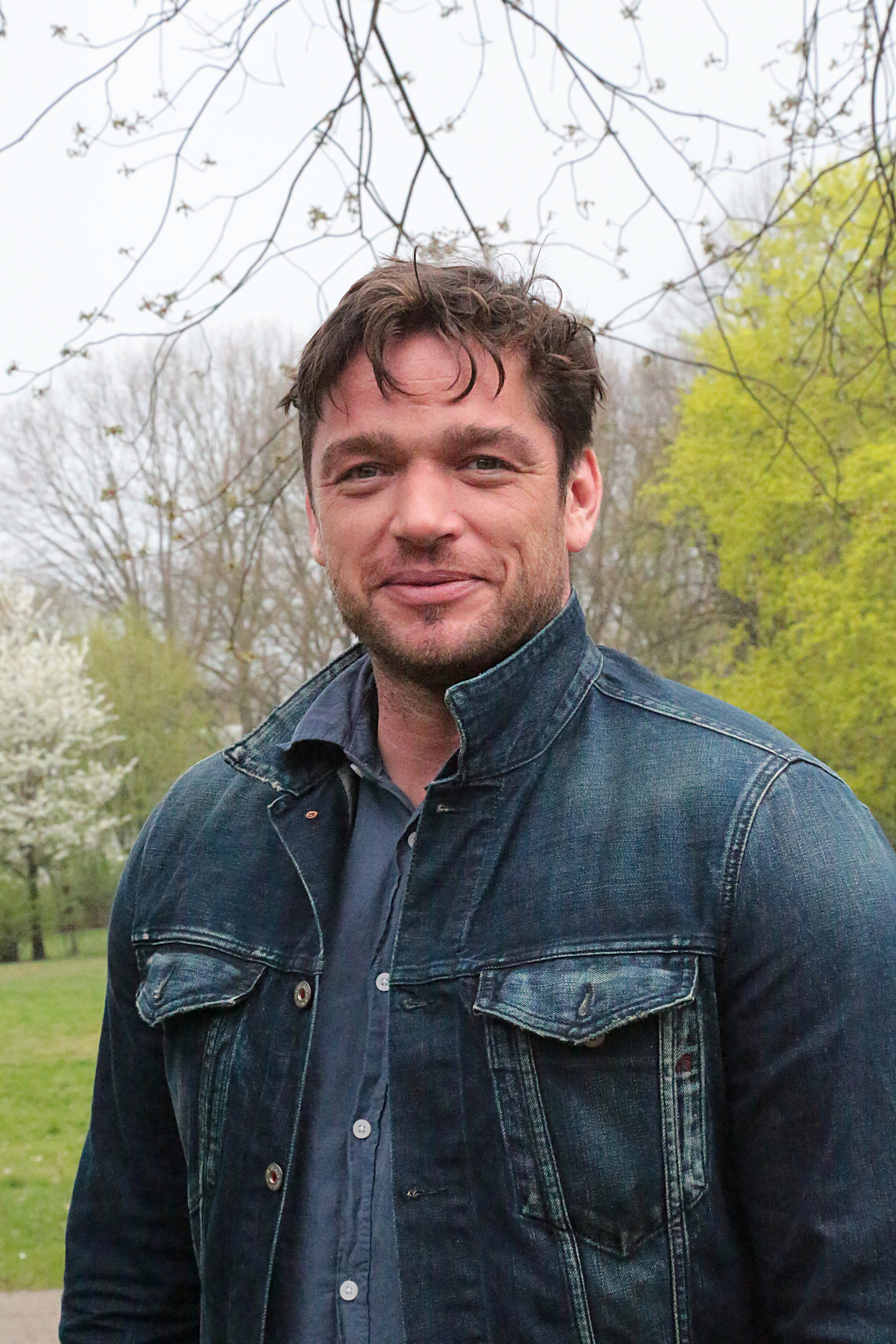 Ronald Zehrfeld beim Grimme-Preis 2018, am 13.04.2018 in Marl.